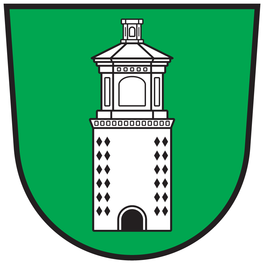 Wappen von Krems